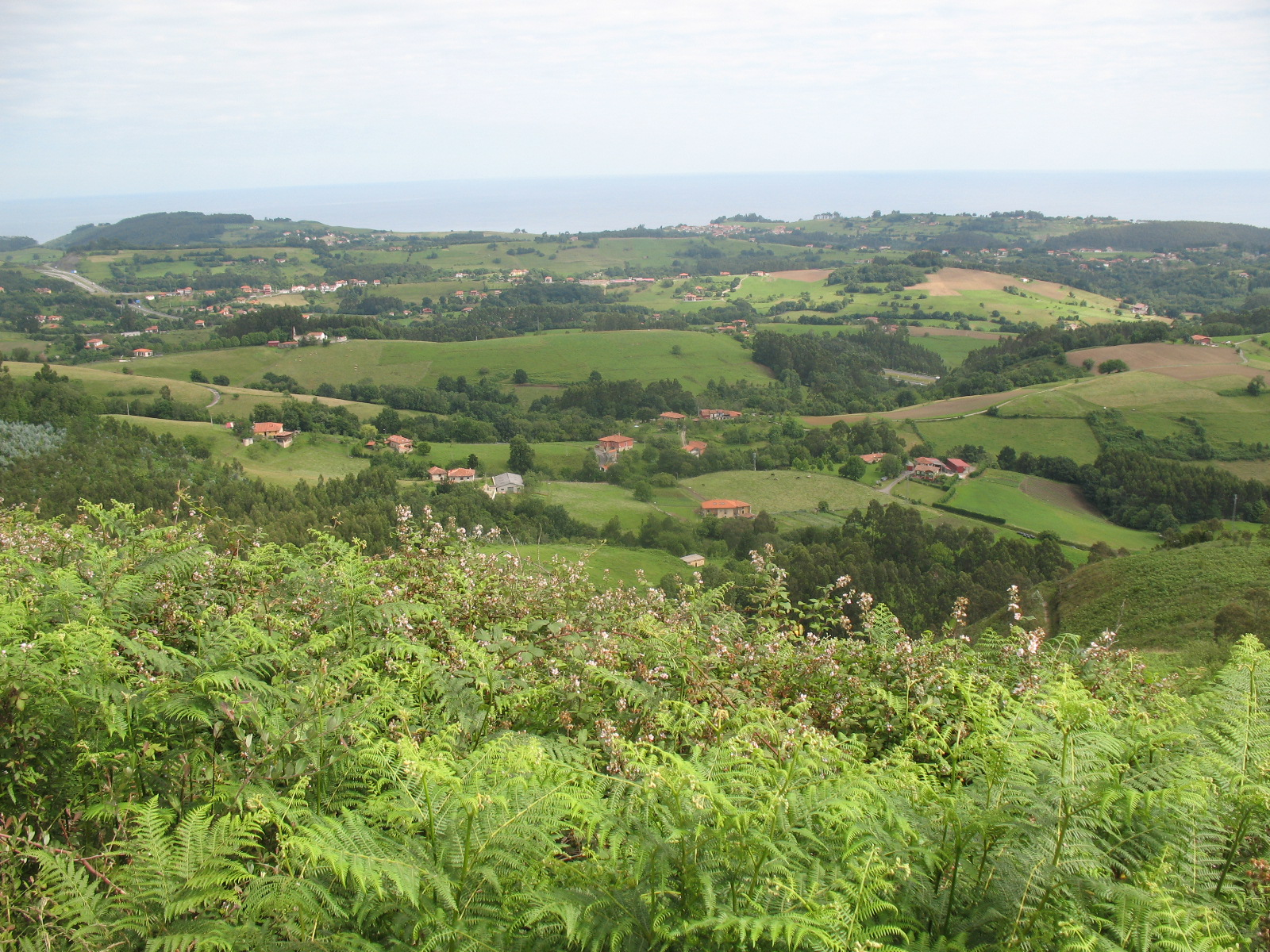 Una vista del paisaje desde Cueva Rosa This is a photography of a Special Area of Conservation in Spain with the ID: ES1200007. Natura2000 entry, EEA entry